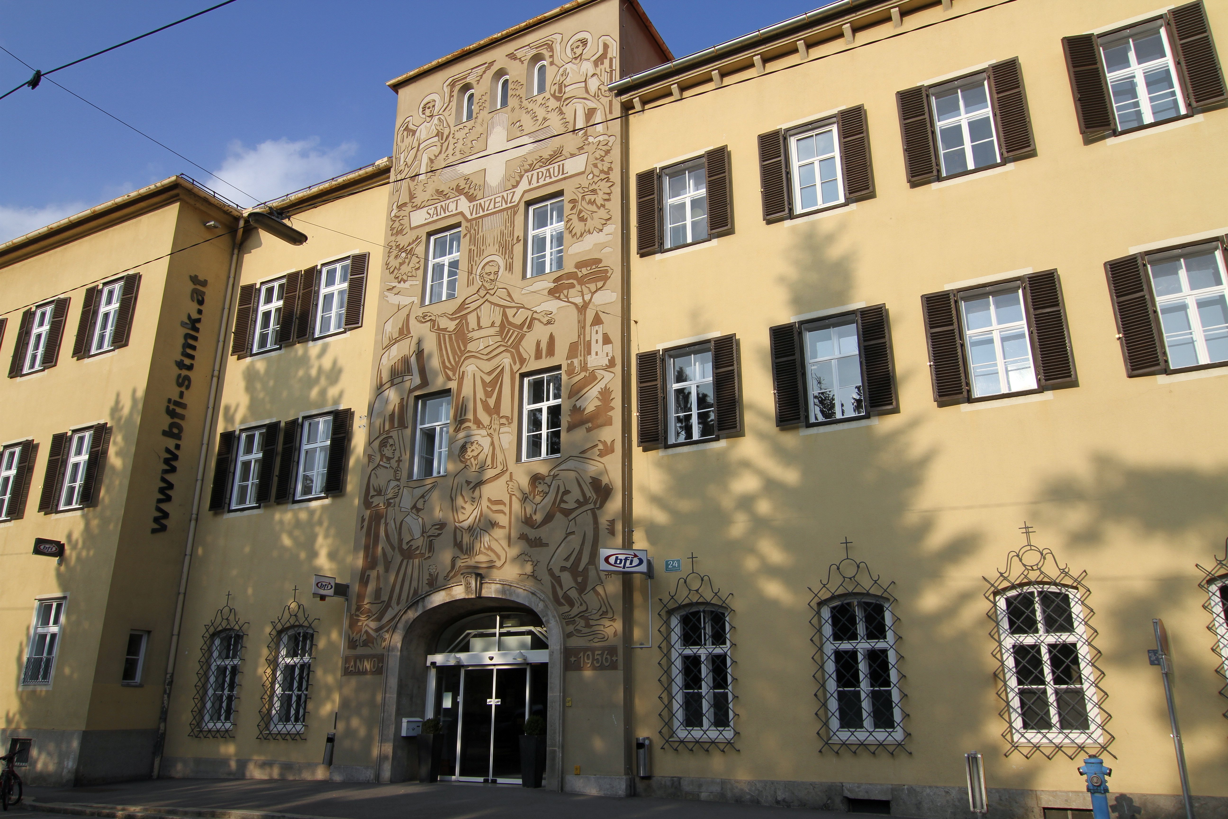 Lazaristenkloster, Berufförderungsinstitut Steiermark, Mariengasse 24, Graz, Österreich